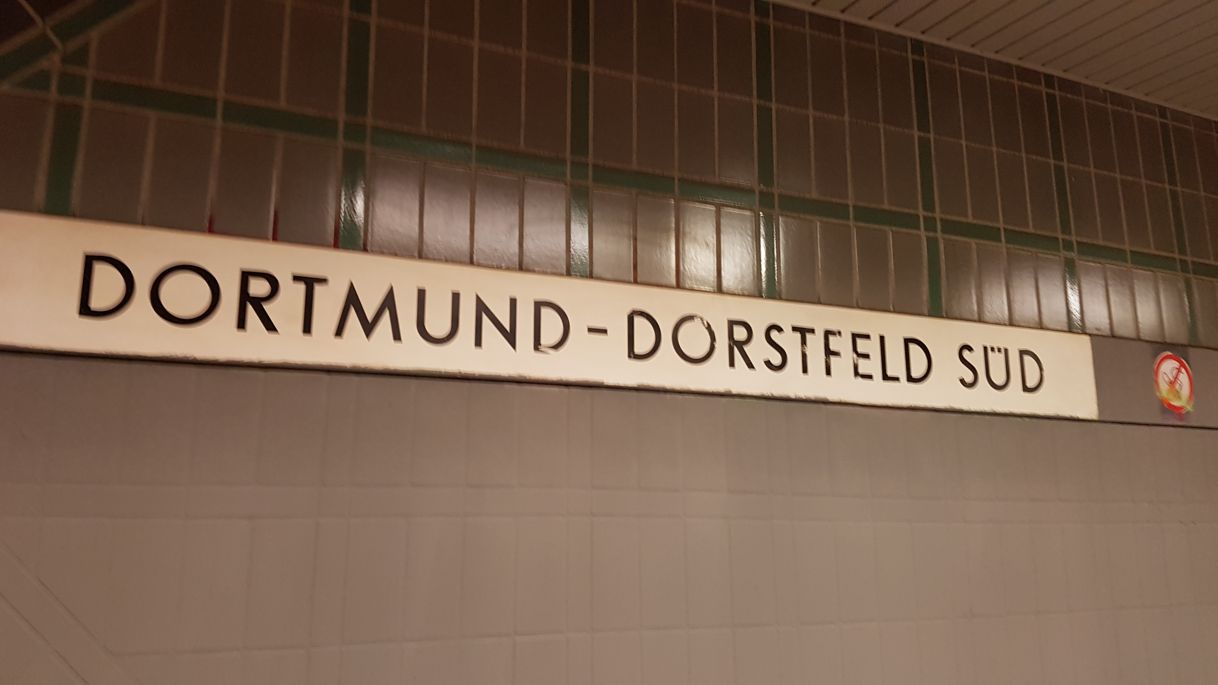 Bahnhofsschild Dortmund Dorstfeld Süd Tunnelbahnhof der S-Bahn Rhein-Ruhr